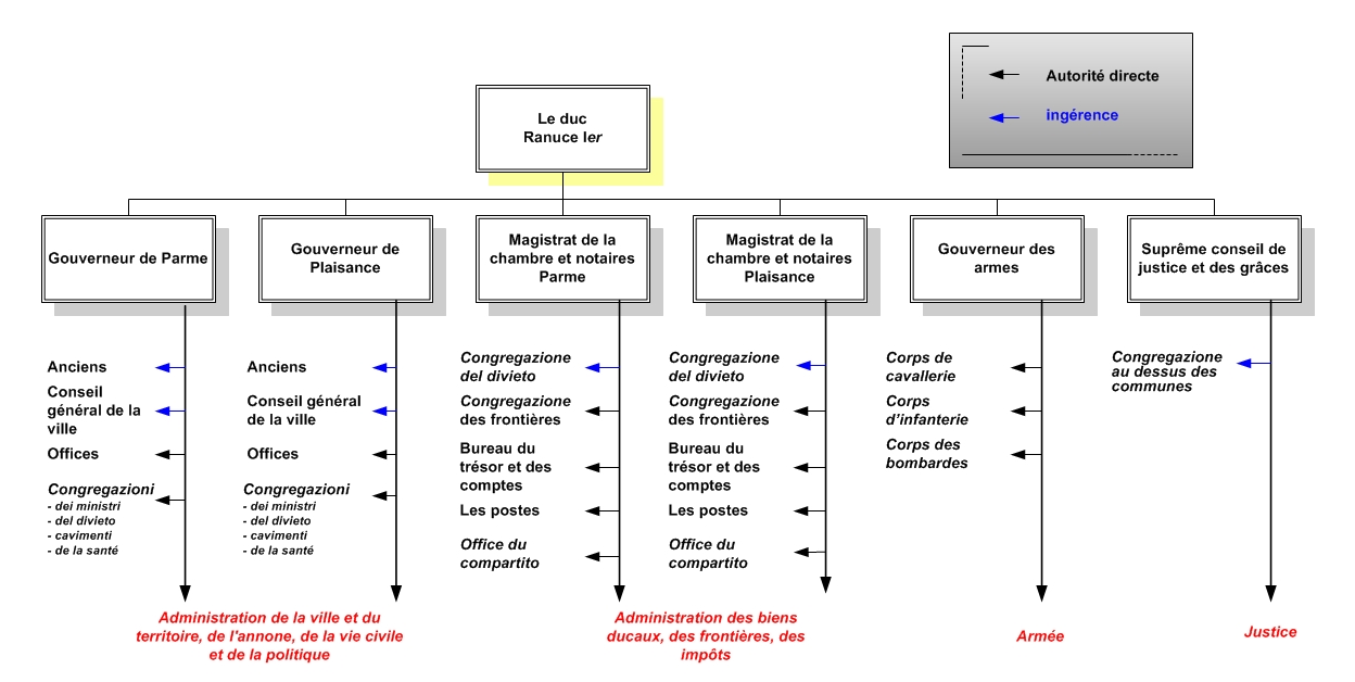 Administrations sous Ranuce Ier